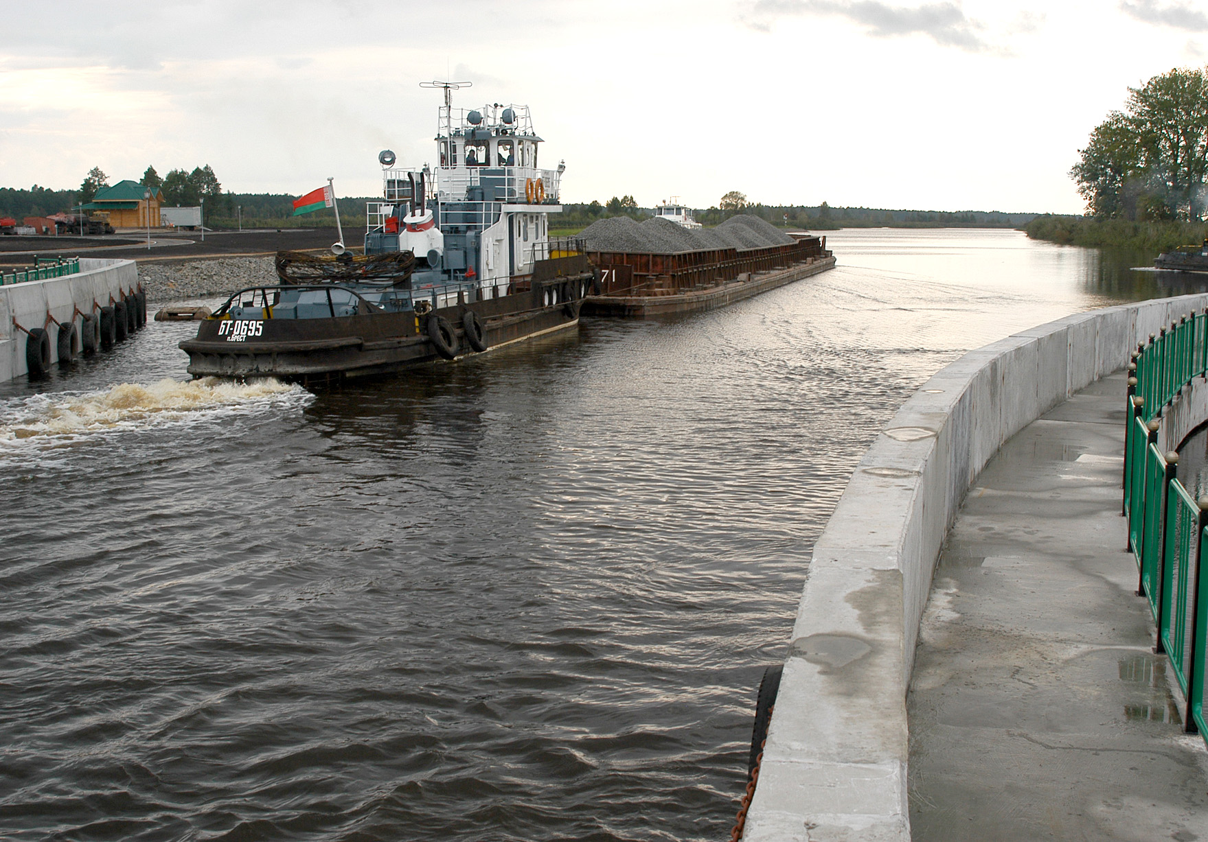 внесена фотография